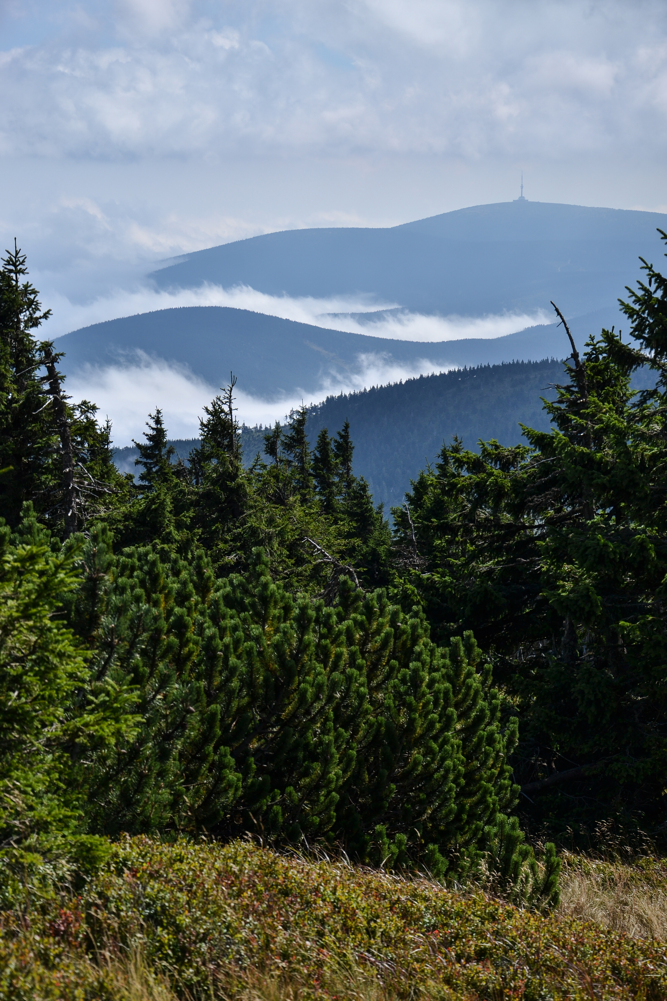 Praděd (Altvater), Hrubý Jeseník